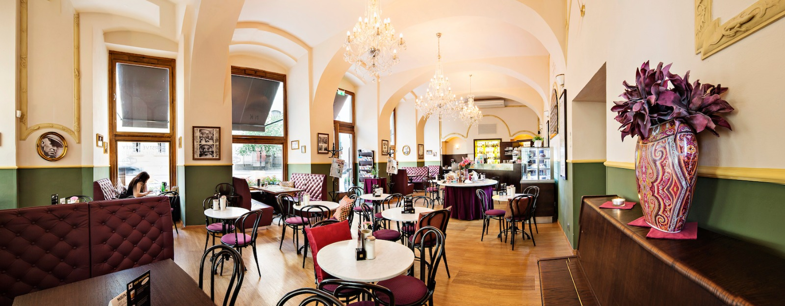 Narodni Kavarna Interior, Praha, 2020